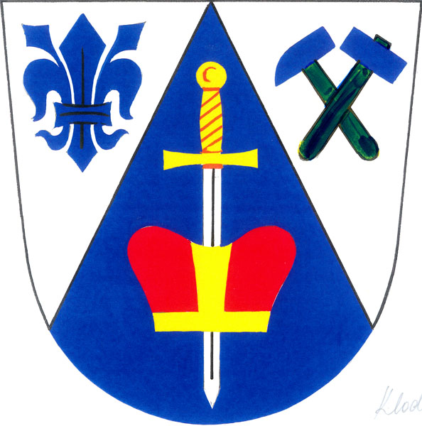 Znak obce Štěchov